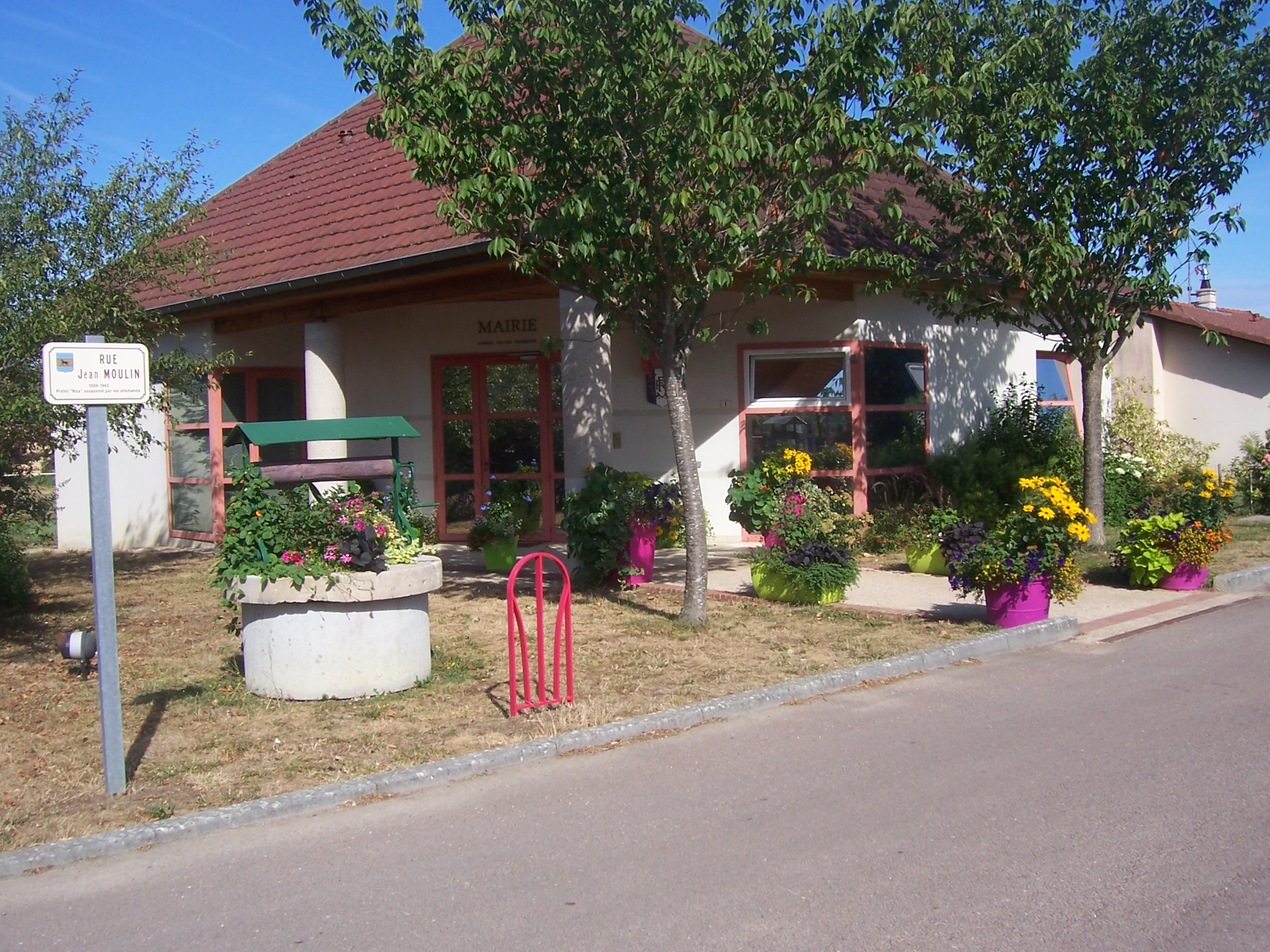 Mairie de Savigny-sur-Seille